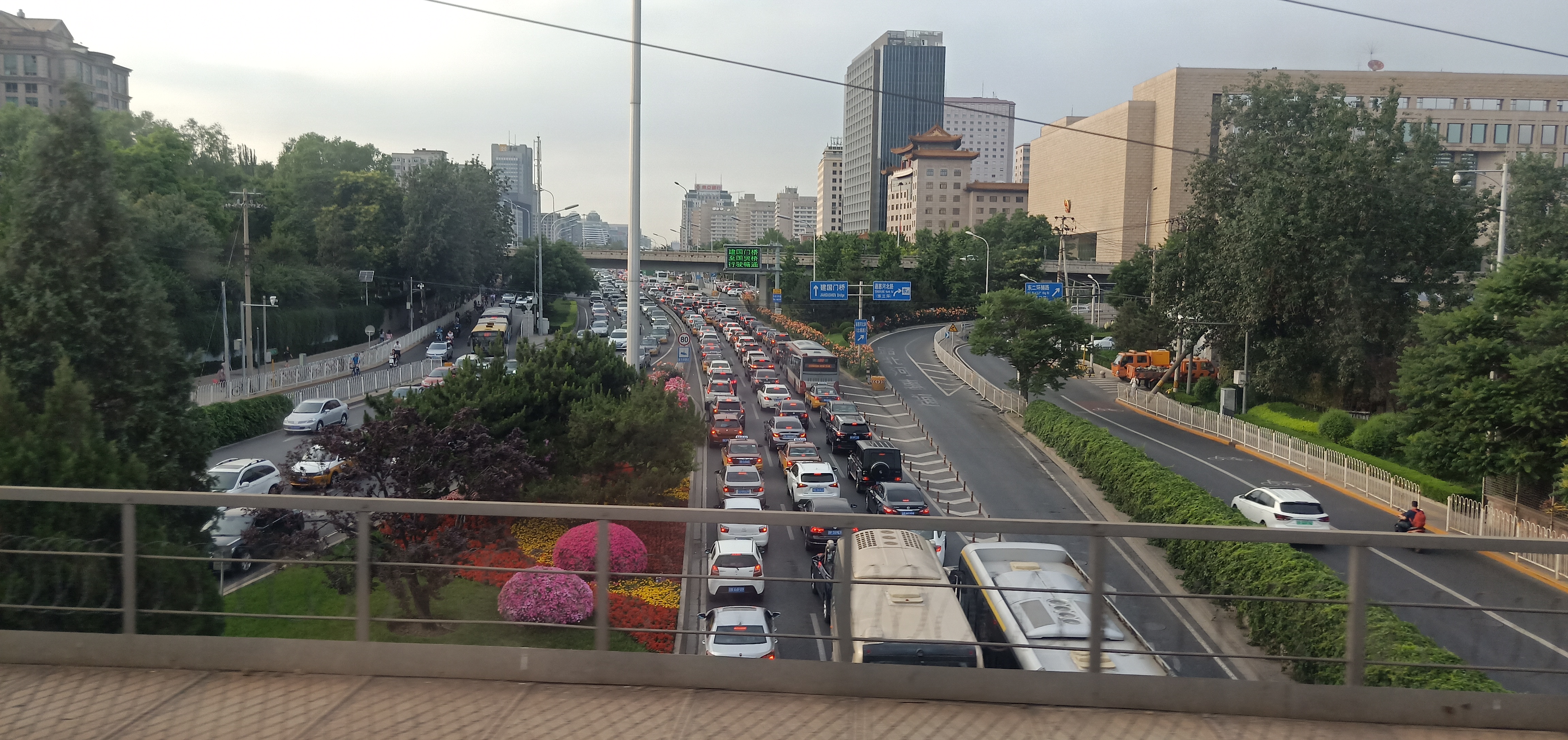 粵語: 北京二環路（東二環中路近通惠河北路口）